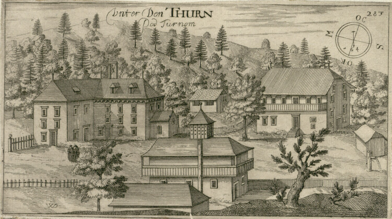 Pod Turnom